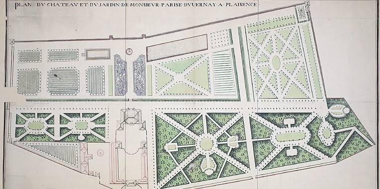 Plan du château et du jardin de Plaisance à Nogent-sur-Marne, dessin conservé au Musée départemental du Domaine de Sceaux. Œuvre réalisée par un anonyme au 18ème siècle. Cote d'inventaire : 71.23.281.